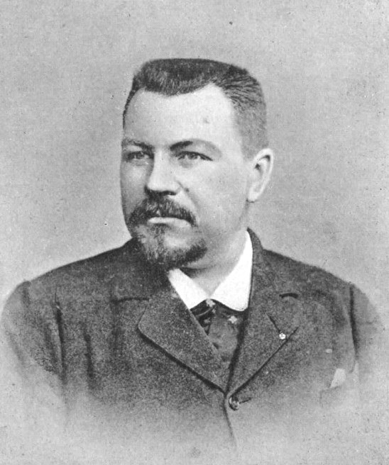 "Paul Ginisty, critique littéraire et dramatique, directeur du Théâtre national de l'Odéon, membre de l'Association syndicale professionnelle des journalistes républicains français, officier de la Légion d'honneur".